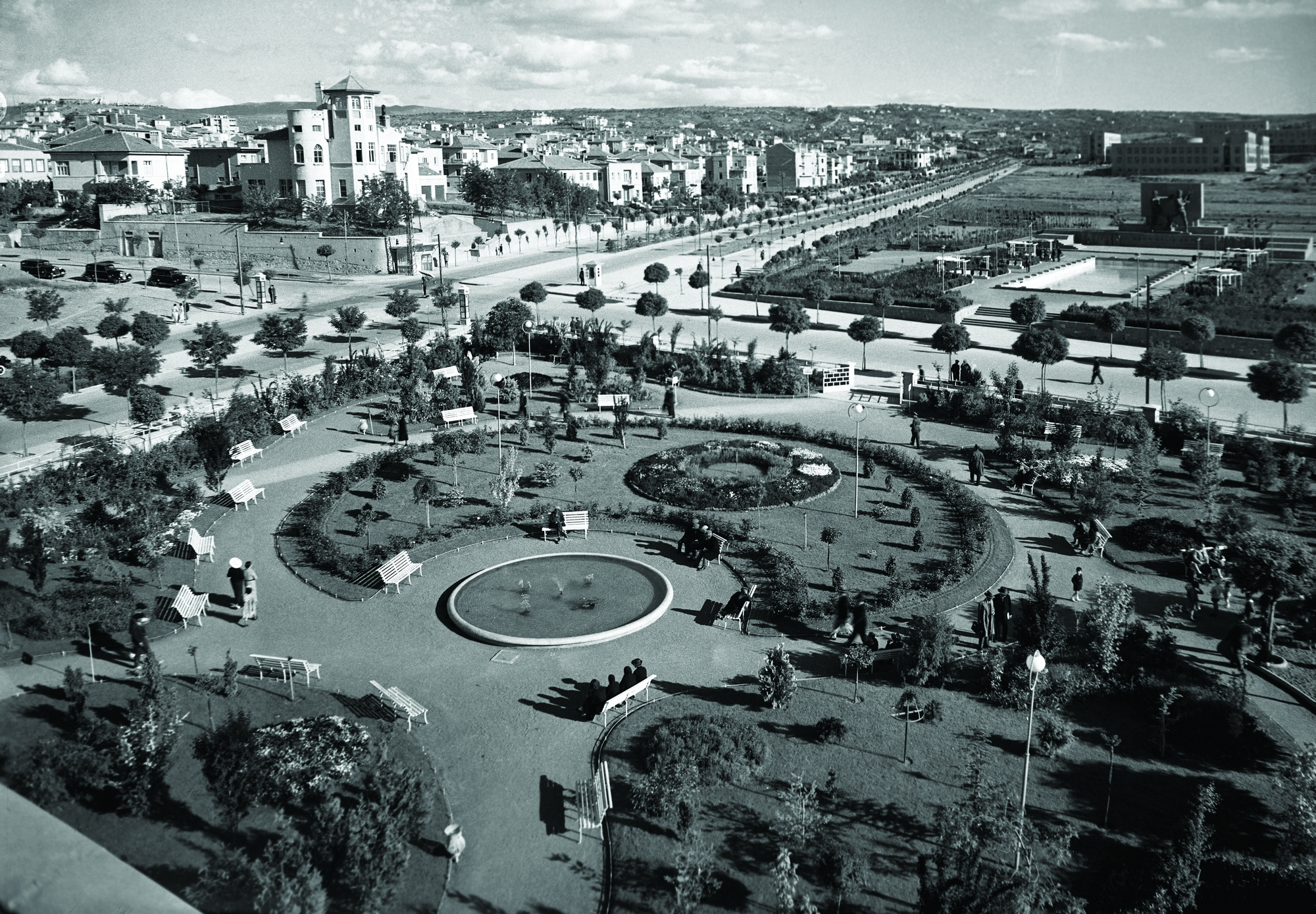 The photo was taken from the top floor of General Directorate of Turkish Red Crescent. We see Kızılay Park, Güven Park and Güven Monument. The left line of the Atatürk Boulevard also can be seen. The highest building with a tower is the Cemil Uybadın Villa which sits on a big garden. Kızılay ve Güven Parkları, Cemil Uybadın Köşkü, 1940’lı yıllar. Fotoğraf Kızılay Genel Müdürlüğü’nün üst katından çekilmiş olmalı. Kızılay Parkı’nı, Güven Park ve Güven Anıtı görülüyor. Atatürk Bulvarı’nın sol tarafını da izliyoruz aynı fotoğraftan. En yüksek yapı geniş bir bahçe içerisine oturtulmuş kuleli bir köşk. Hemen belli oluyor. Cemil Bey’in köşküdür. 1906 yılında Erkân-ı Harp Kolağası Mustafa Kemal Bey sürgün kokan bir hava içerisinde yeni görev yerine, Şam’a gönderilmiş. Yalnız Şam’da durmayıp gizlice Mısır’a geçecek. Oradan gemiye biniyor, doğduğu kente, Selânik’e. Gemi limana geliyor. Ama limanda kontrol sıkı, inmek, kente girmek olanaksız. Yardımına Selânik Merkez Komutan Muavini Mümtaz Yüzbaşı Cemil Süleymaniye Bey yetişiyor. Onu gemiden alıp, kente sokuyor. Cemil Süleymaniye, Cumhuriyet yıllarında Mehmet Cemil Uybadın’dır. Mebus oldu. Bir ara, Dahiliye Vekili idi. Bu görkemli yapı, 1925, 1926 yıllarındandır. Bir ara konut olmaktan çıktı, Sular İdaresi’ne bırakıldı, en sonunda yıkıldı.